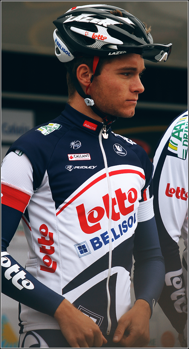 Tosh Van der Sande voor de Lotto-Belisol ploeg anno 2012